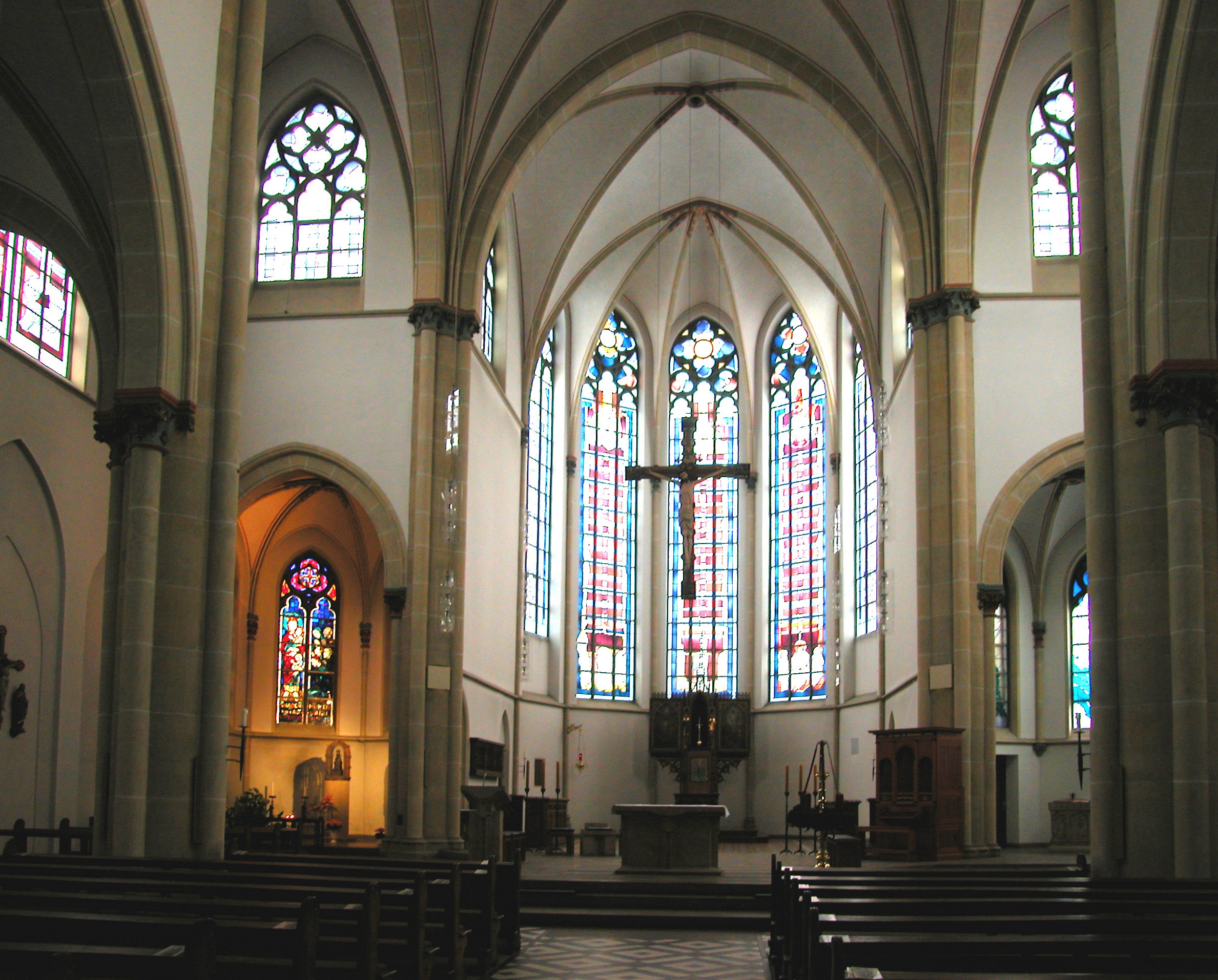 Innenraum St. Marienkirchen. Luenen (de); Внутренний вид церкви св. Марии. Люнен (ru).